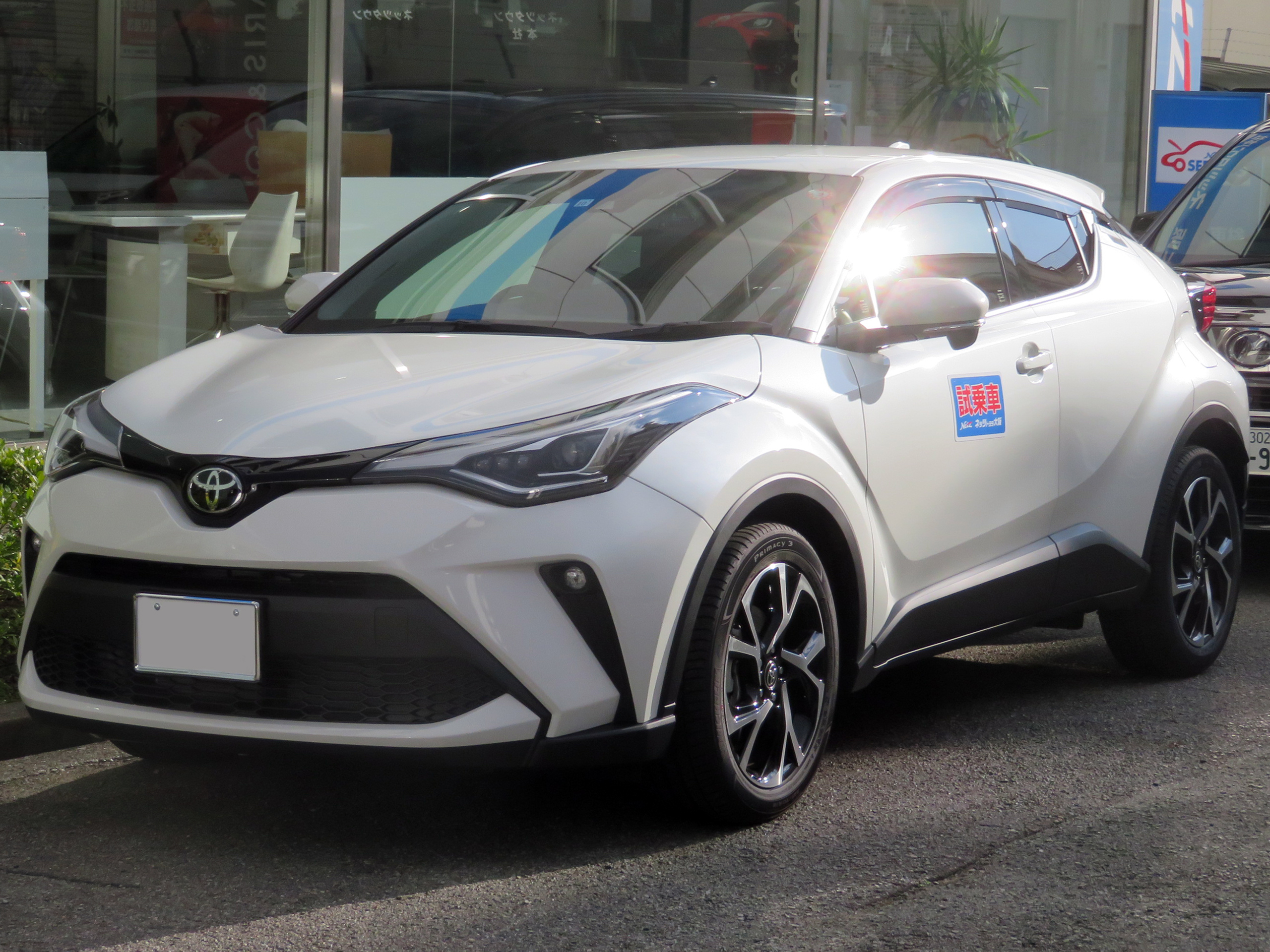 DBA-NGX10-AHXEX型トヨタ・C-HR G-T 2WD・CVTをフロントから撮影。